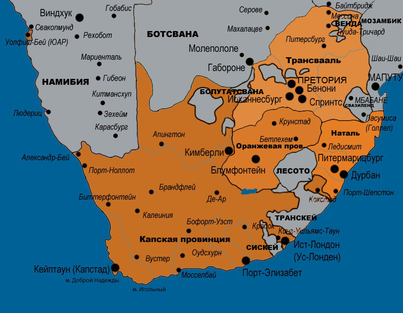 Карта ЮАР 1991 года